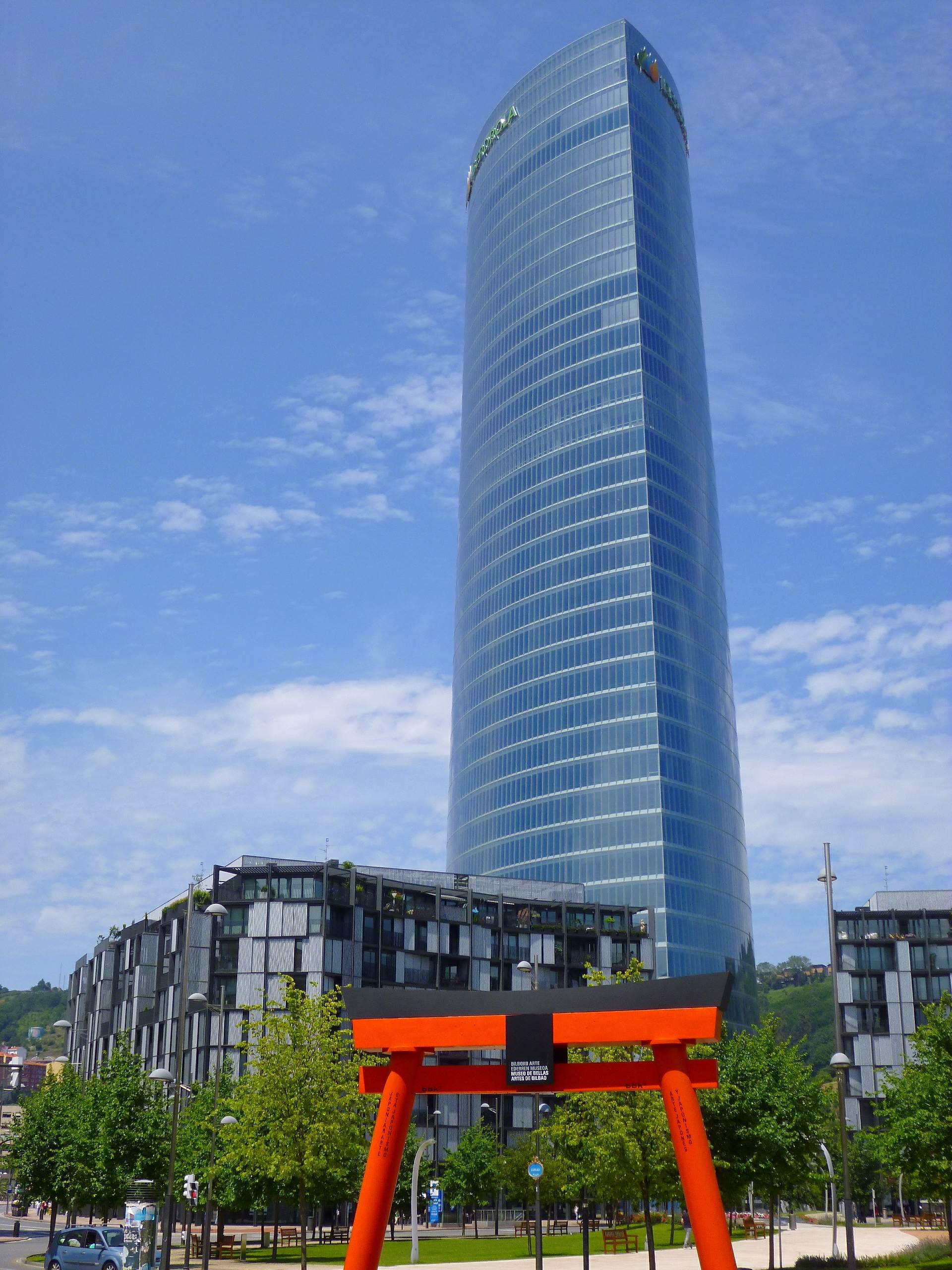 Torre Iberdrola, en Bilbao